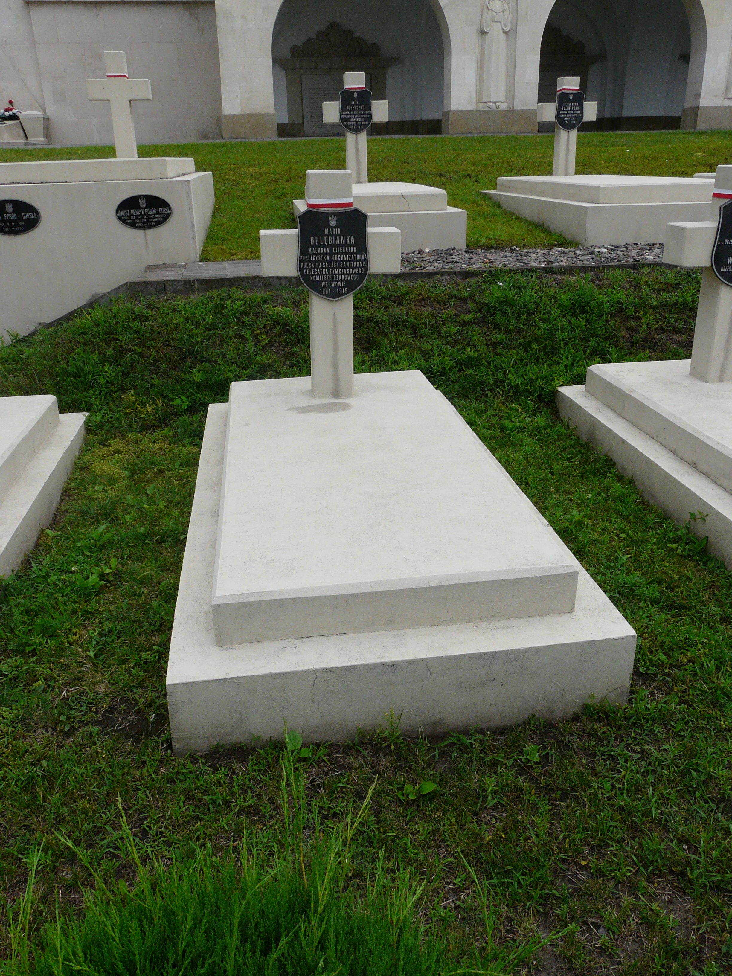 Lychakiv Cemetery in summer 2017. Maria Dulębianka (1861-1919). Malarka, literatka, publicystka, organizatorka polskiej słuzby sanitarnej, deletatka Tymczasowego Komitetu Rządowego we Lwowie